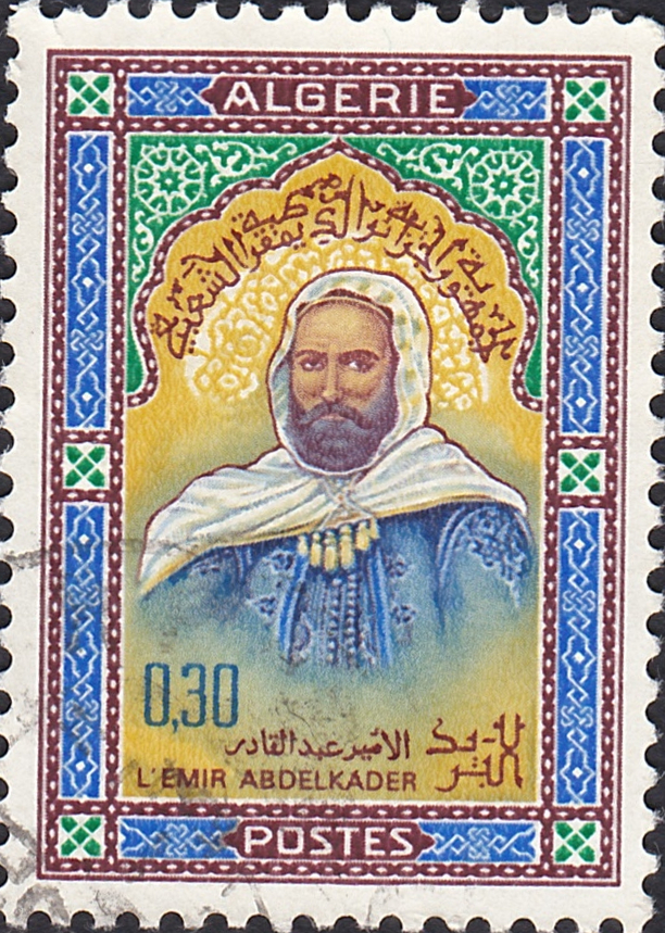 Timbre de l'Algérie, 0,30DA, émission de 1966.